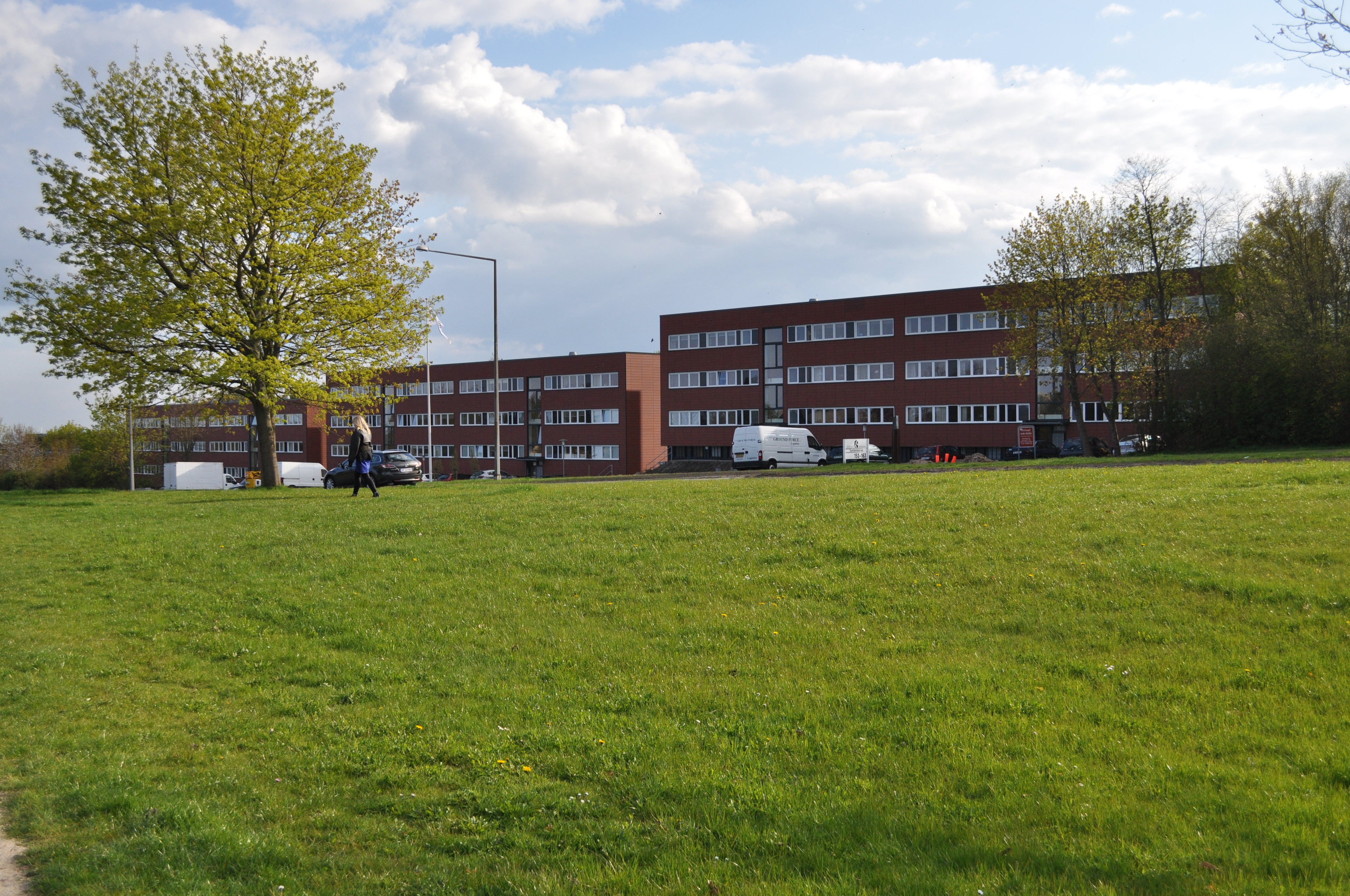 Sønderskovvej i Lystrup nord for Aarhus